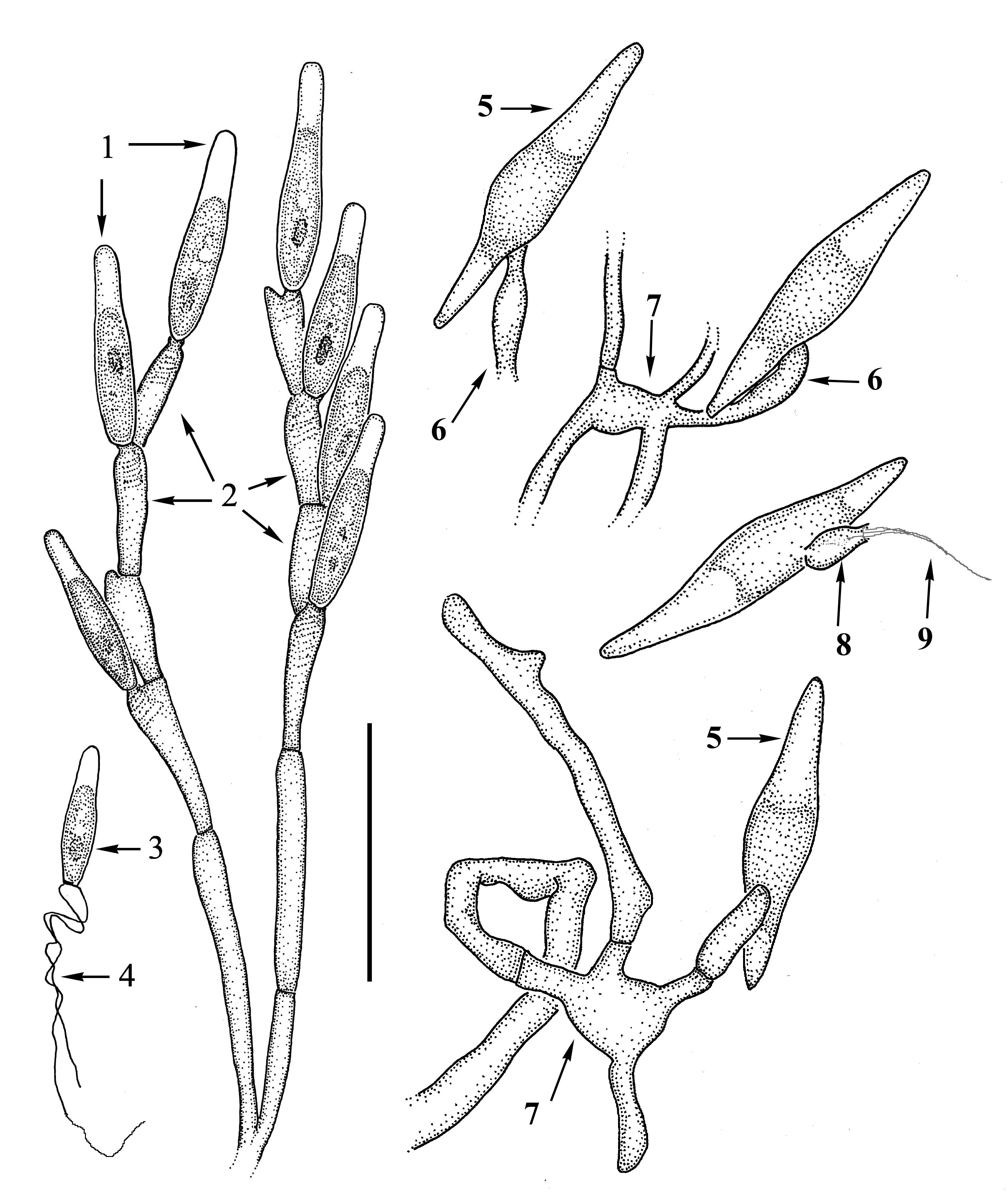 Legeriomyces ramosus. 1. Trichospores. 2. Generative cells. 3. Loose trichospores with two appendages (4). 5. Zygospores (sexual spore). 6. Zygosporophore. 7. Conjugation tube. 8. Zygospore collar. 9. Zygospore appendages